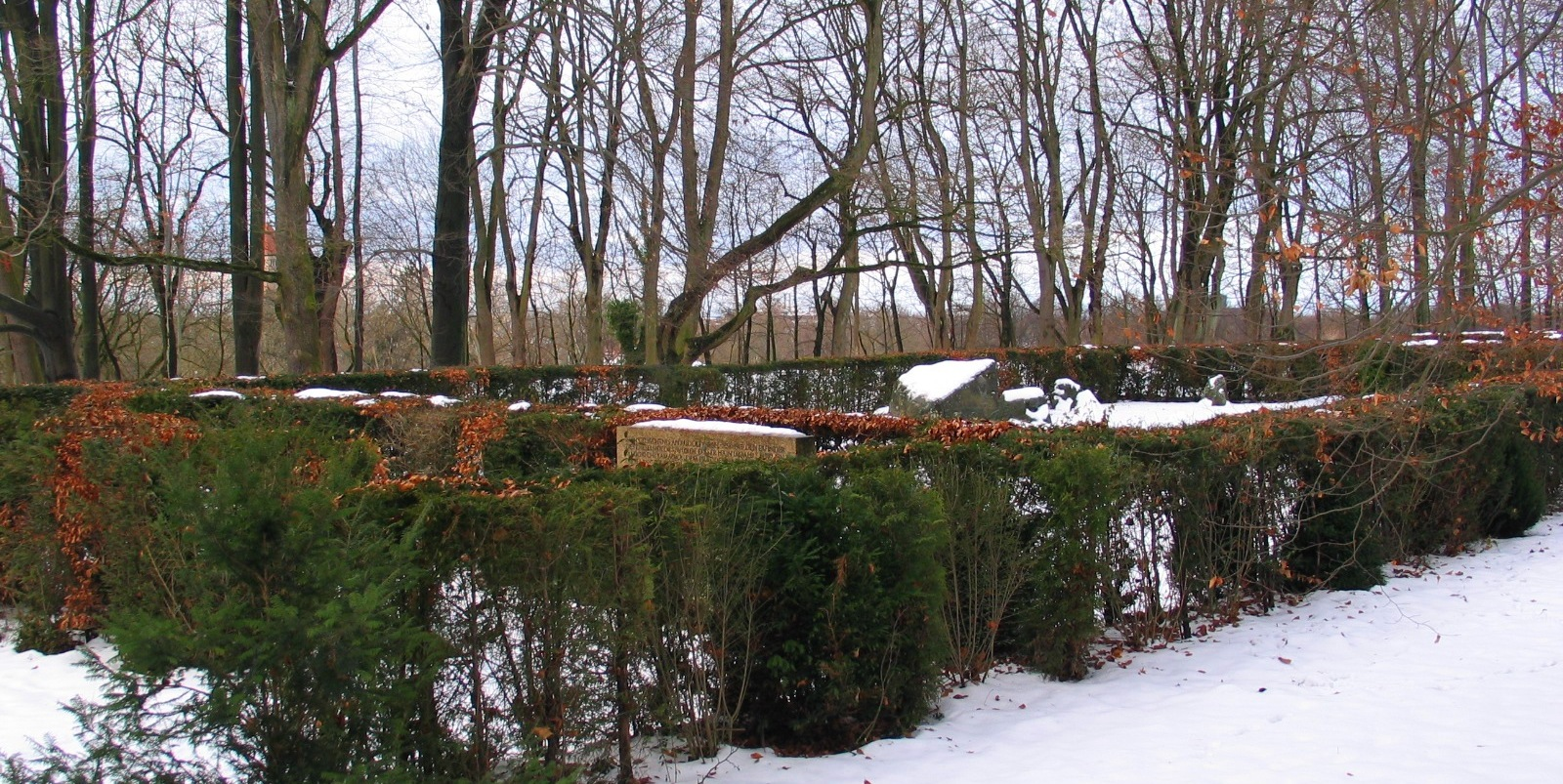 Wittelsbacher Park, Rudolf-Diesel-Gedächnishain